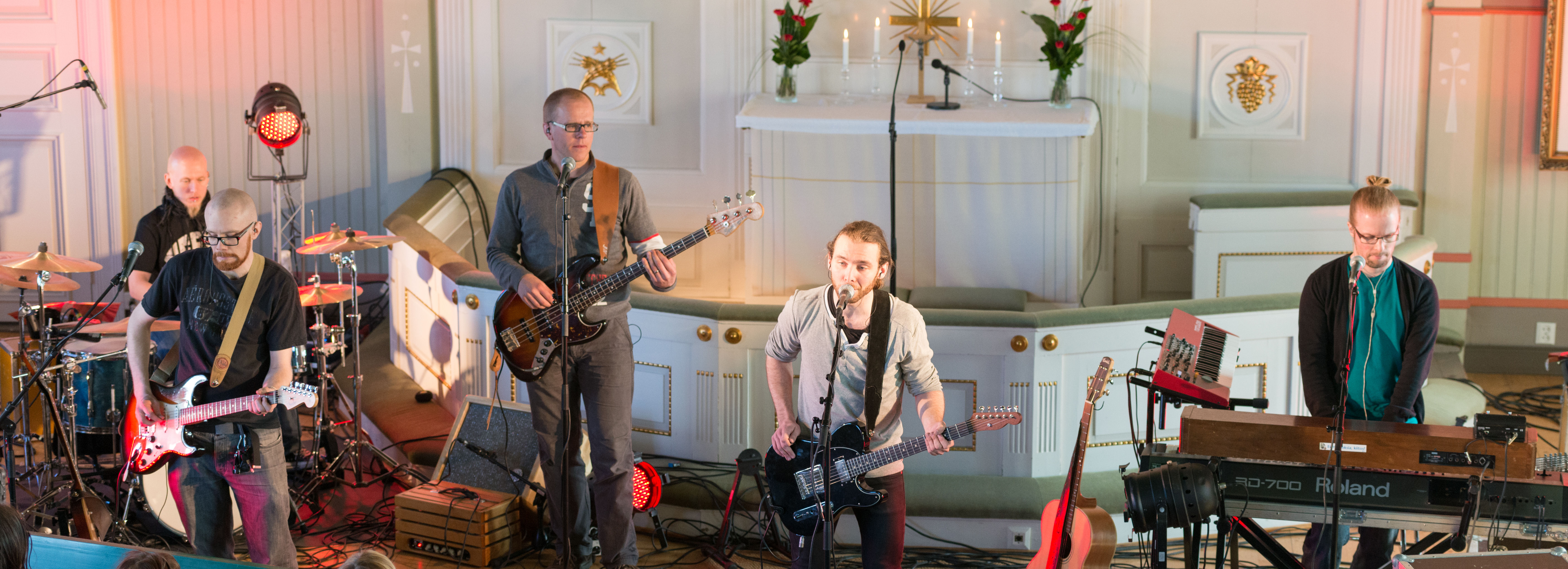 Pro Fide suomalainen gospel yhtye